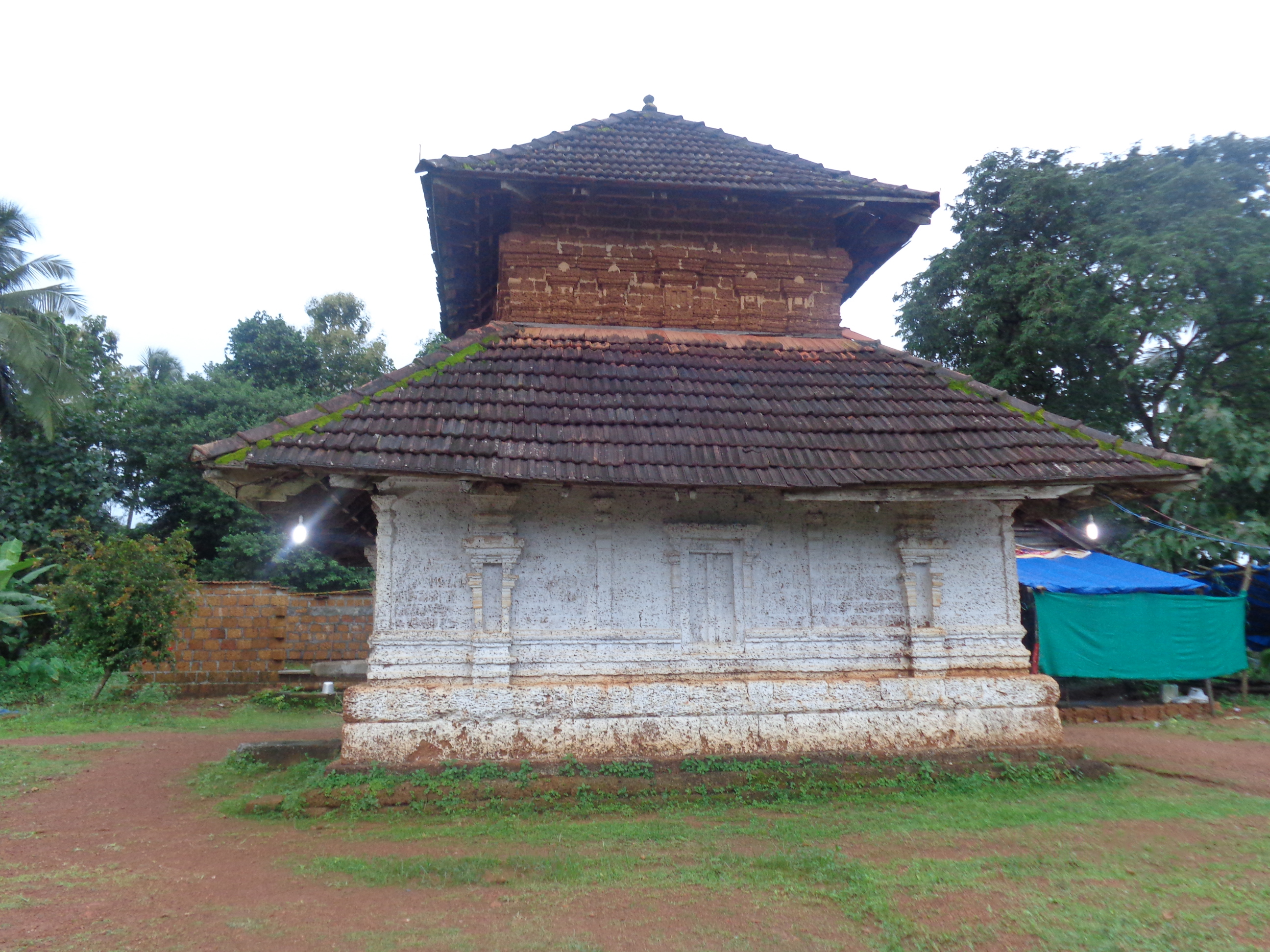 satrughna temple in naranath, near malappuram